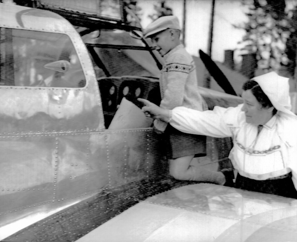 10,000 människor och 40 flygplan invigde på söndagen Sveriges 30:e officiella flygfält, Orsa flygfält 10 km norr om kyrkbyn just i vinkeln mellan järnvägslinjen till Bollnäs och Sveg.